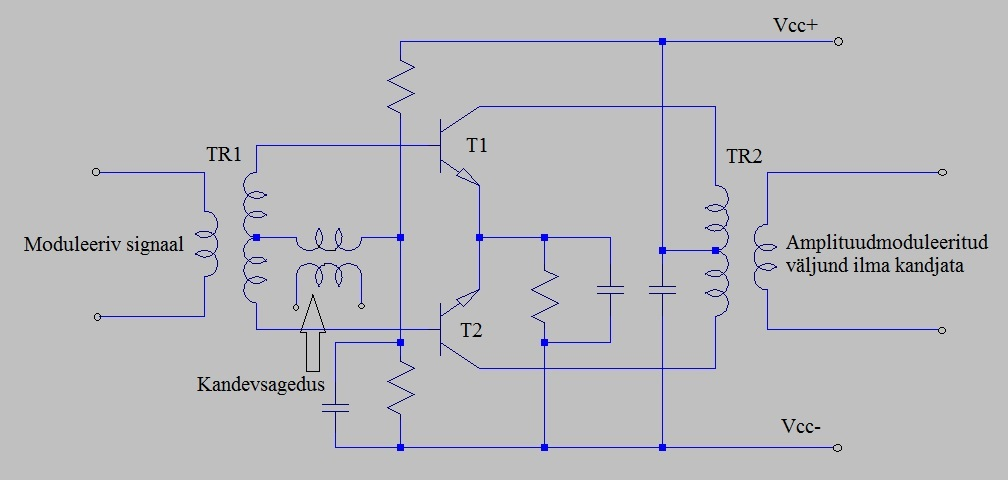 Transistormodulaator amplituudmodulatsiooni teostamiseks